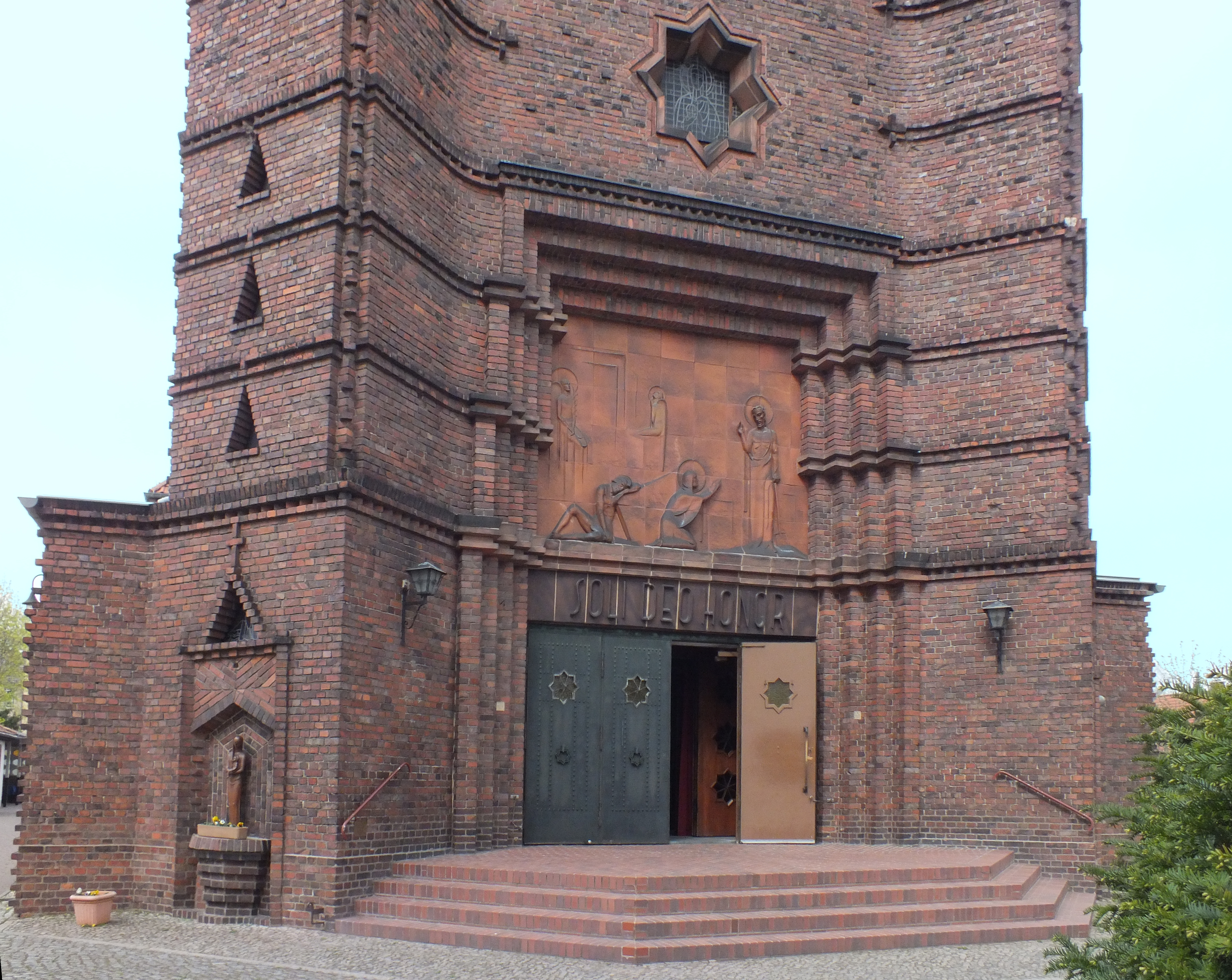 kathol. Kirche Maria Magdalena, Niederschönhausen: Hauptportal an der Turmfront